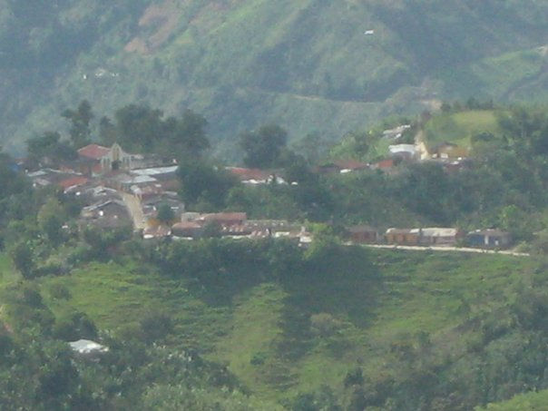 Vista periférica de San Jeronimo Tolima